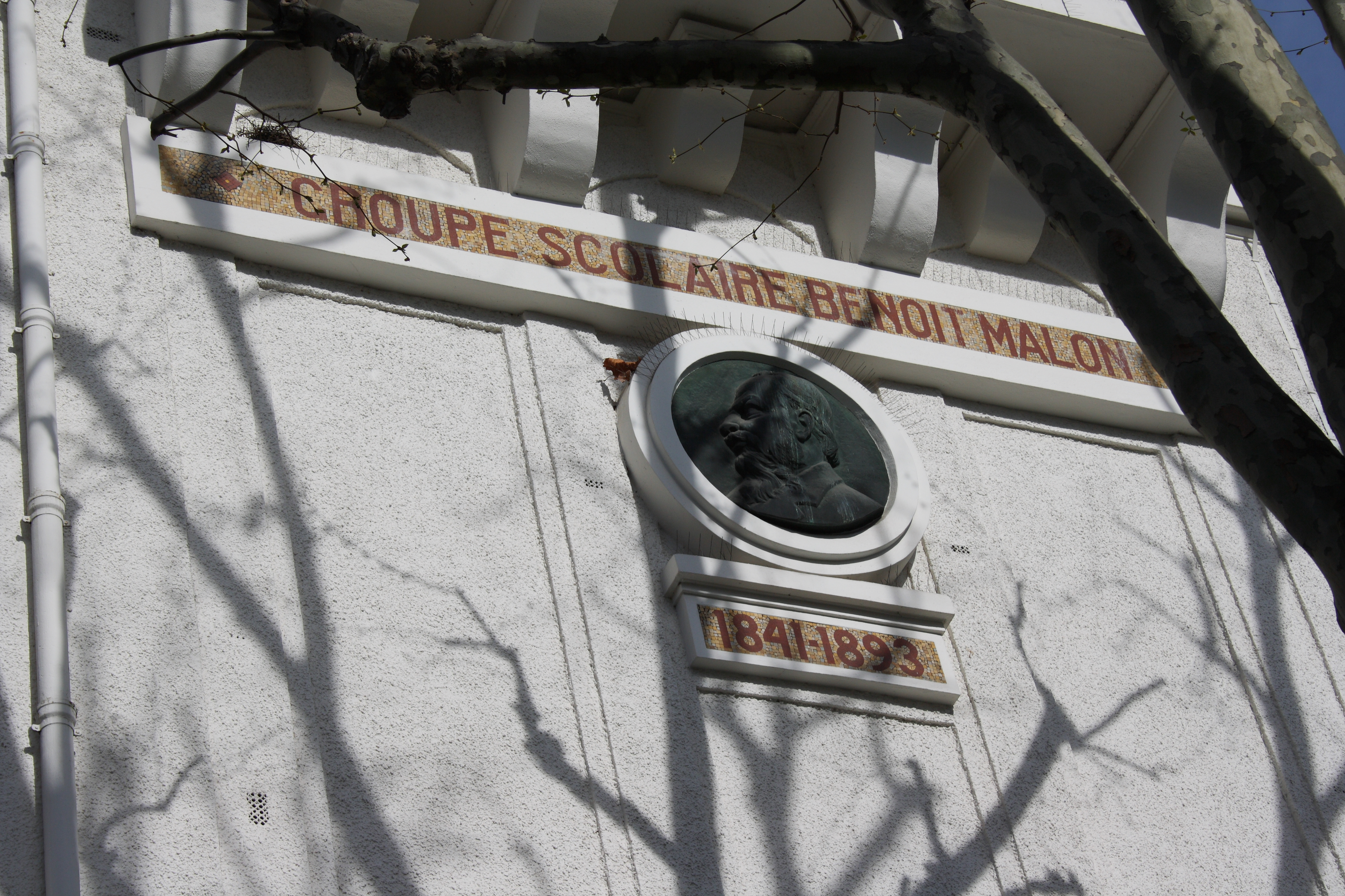 Relief von Benoît Malon am Gebäude der "Groupe scolaire Benoît Malon" in Puteaux